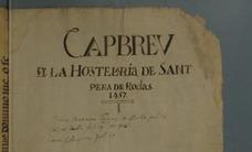 Capbreu del s. XV extret de l'ACA, ORM.MH Vol 973